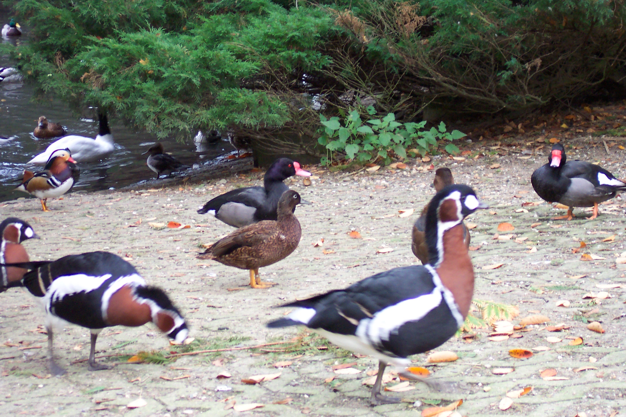 Wuppertaler Zoo, Wuppertal